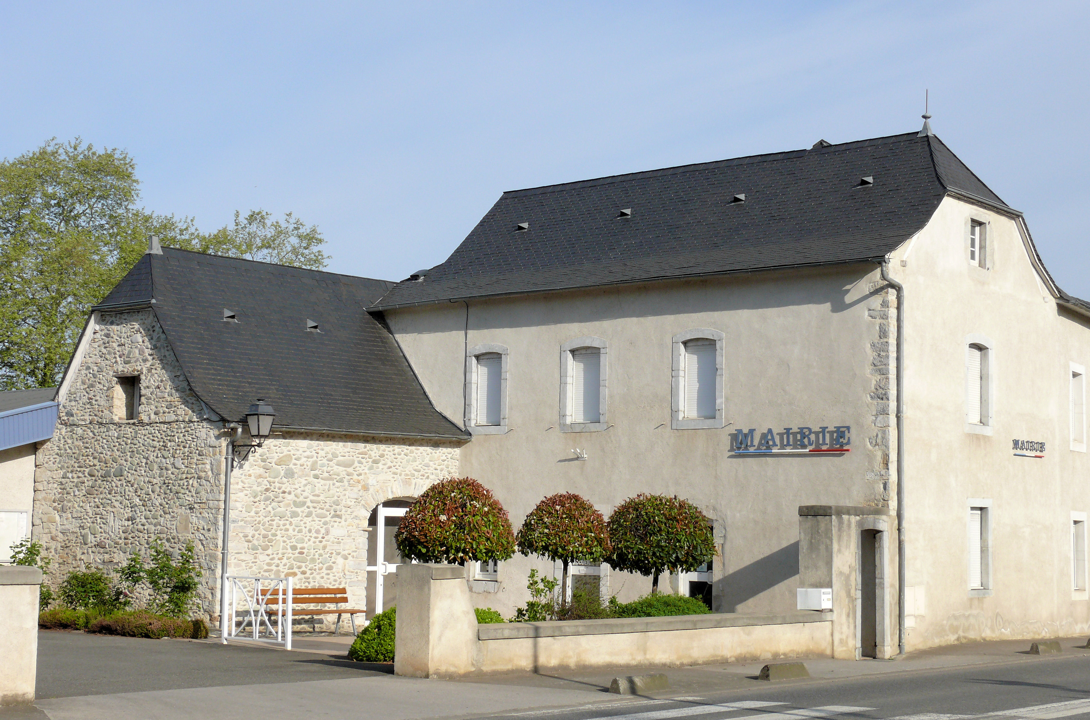 Gurmençon - Mairie